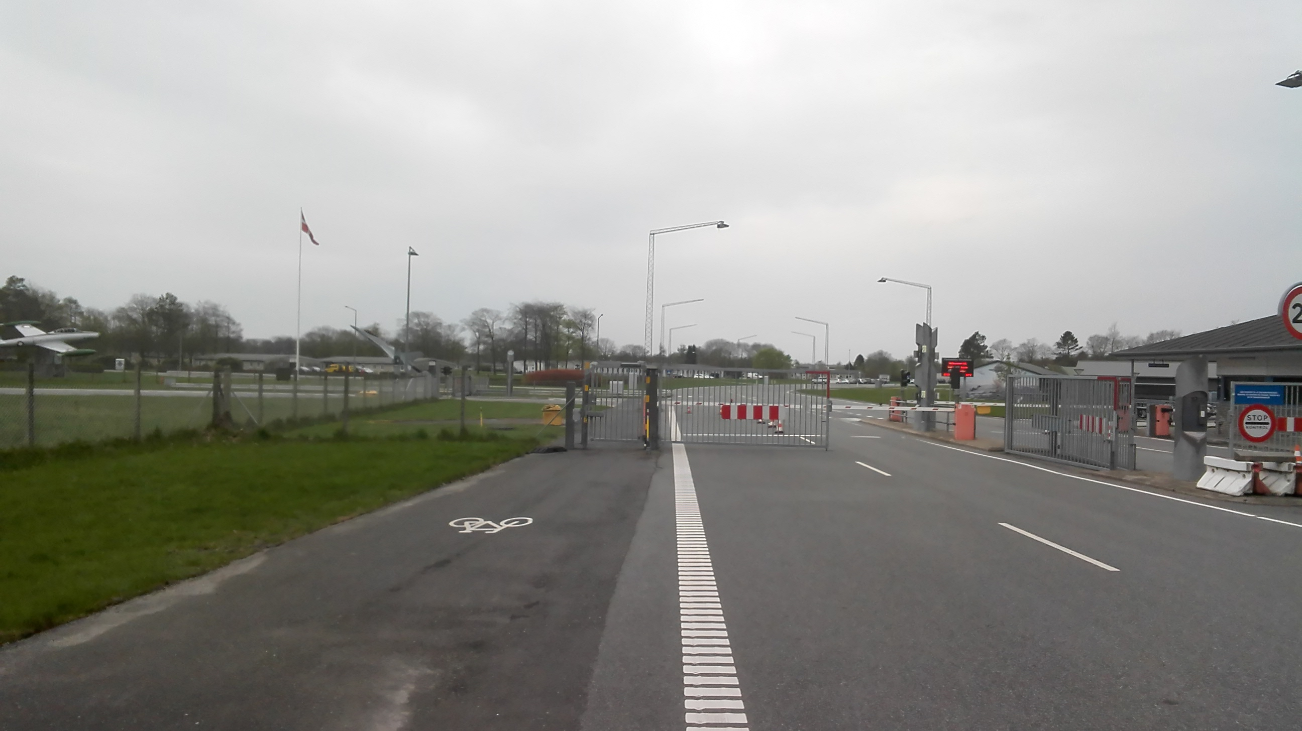 Porten til Flyvestation Skrydstrup